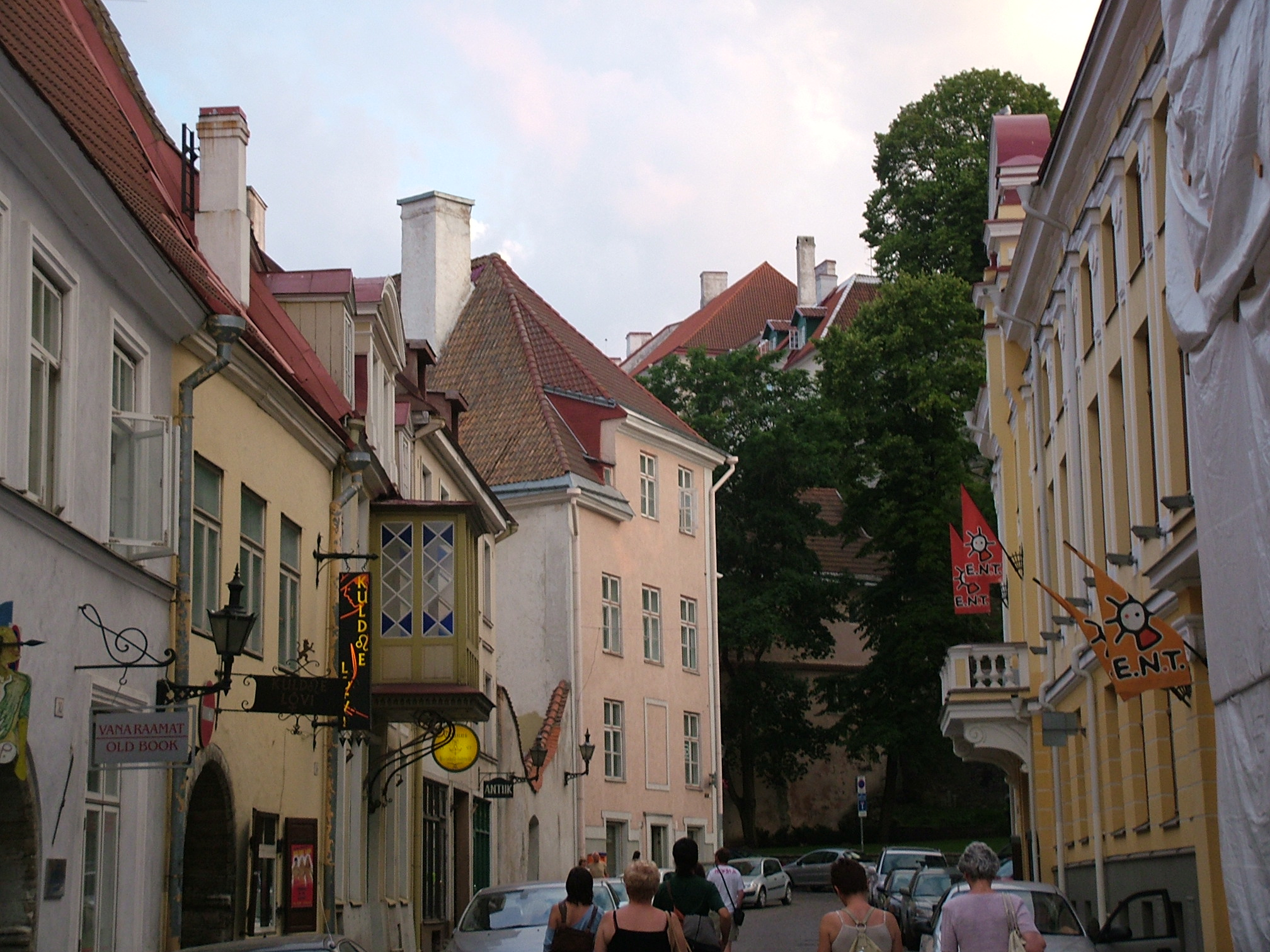 Street in Tallinn, Estonia.